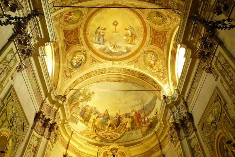 Chiesa di San Pietro, Diano San Pietro, Liguria, Italia